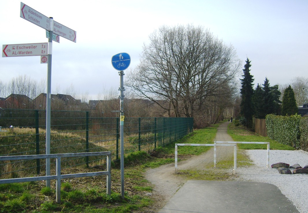 Ehemalige Trasse der Bahnstrecke Aachen-Nord–Jülich an der Goethestraße im Alsdorfer Stadtteil Hoengen: heute Radweg